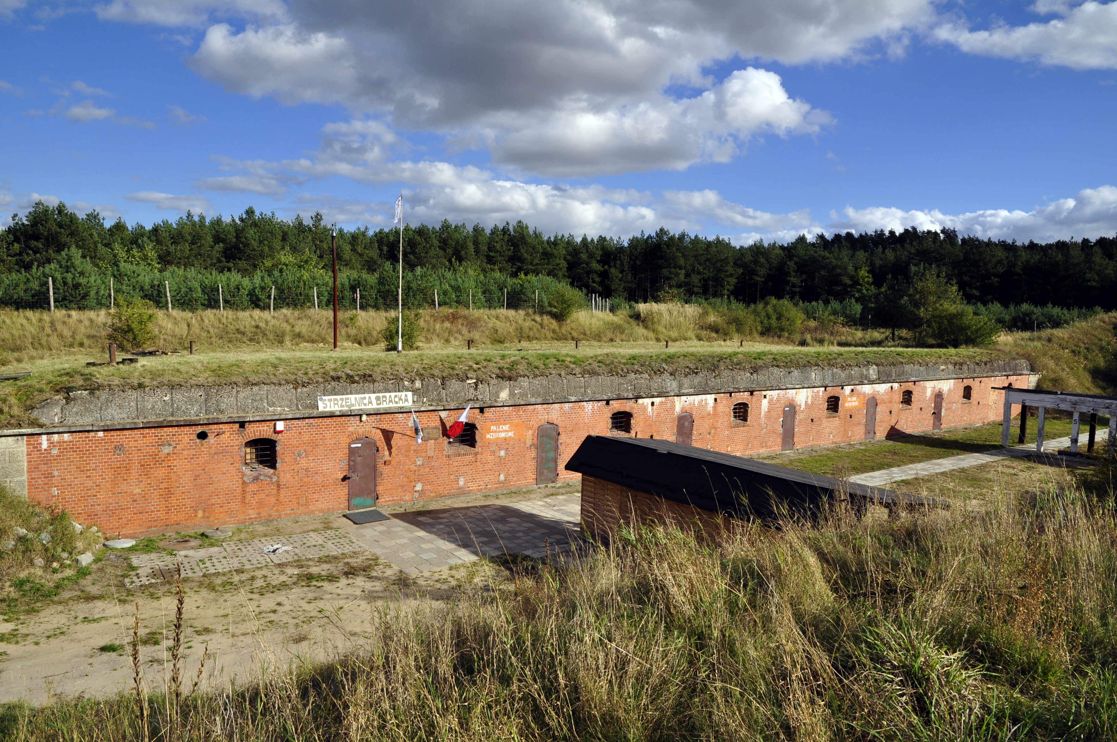 Klamry - Fort VIII (1903-1914) w zespole Twierdzy Chełmno